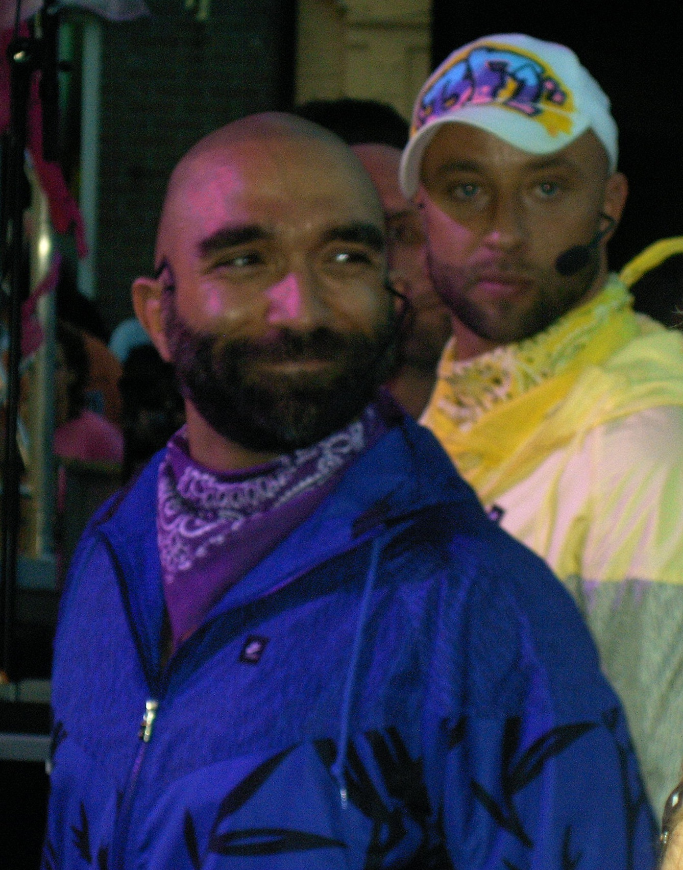 Twee leden van de band Bearforce 1, Roze Zaterdag Tiel